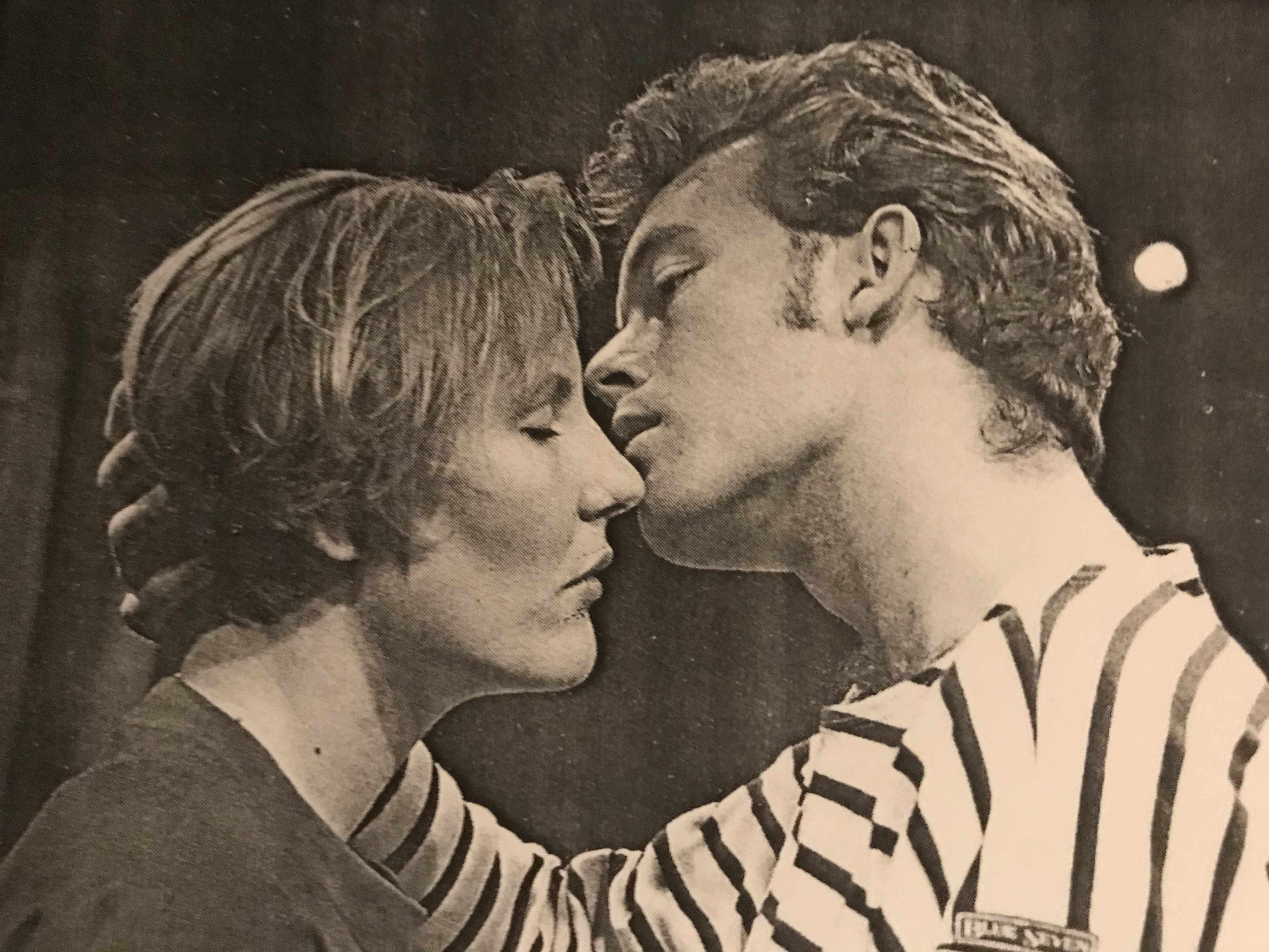 Odense Teater 1992